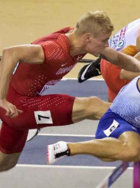 EKI20185 series 60mH martinot lagarde